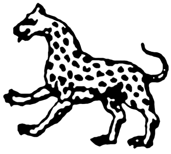 Символ Псковской республики. Прорись по В. Л. Янину с печати Господарства Псковского. До 1510 года.